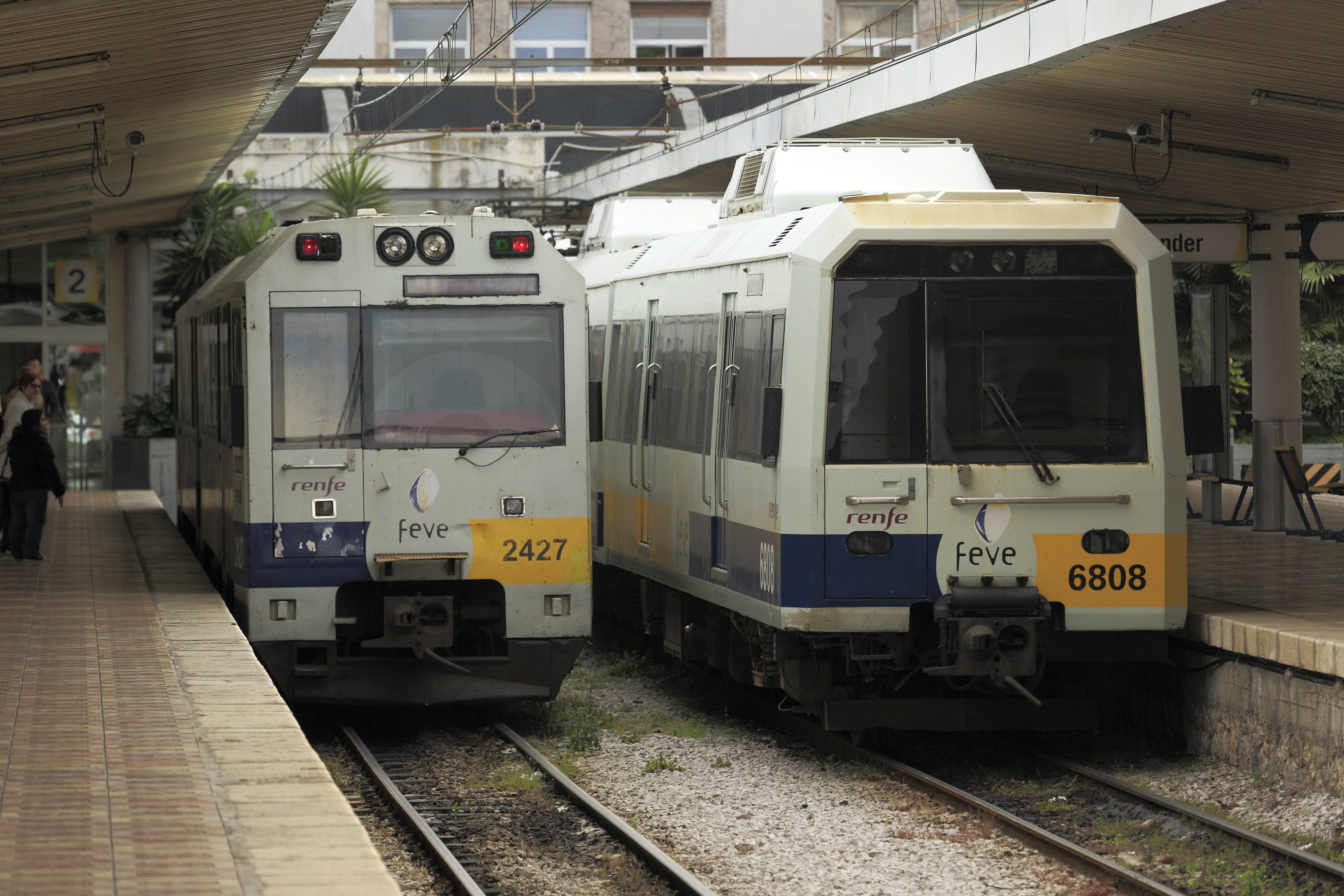 Links der Regionalzug nach Oviedo, rechts eine S-Bahn-Einheit mit vorauslaufendem Steuerwagen.